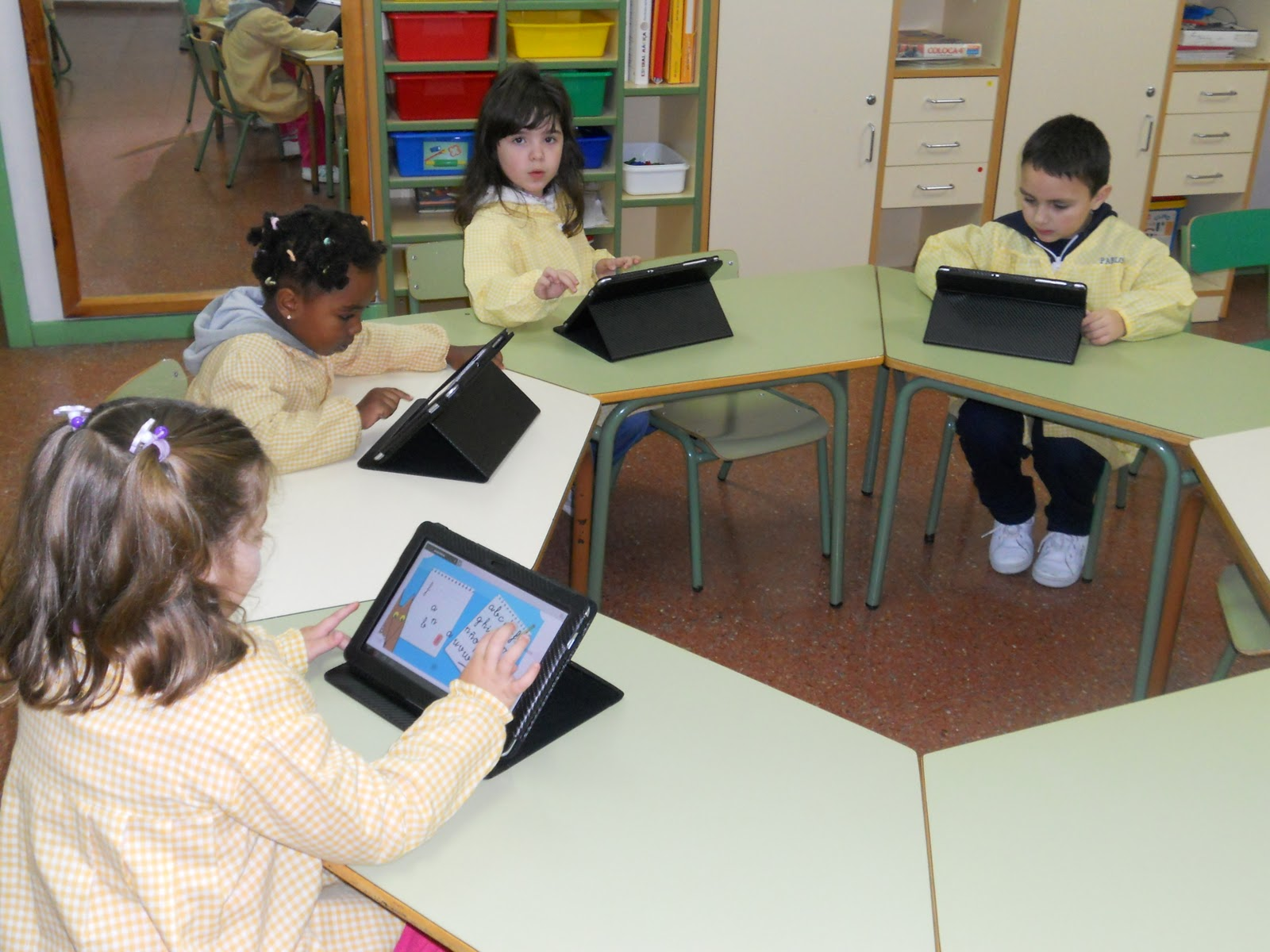 Centro de Educación Inicial San Pablo II. Riobamba. Niños de 2 a 5 años. rincón de compùtación y audiovisuales, aprendizaje de inglés, vocalización, sonidos, etc con apoyo de tablets